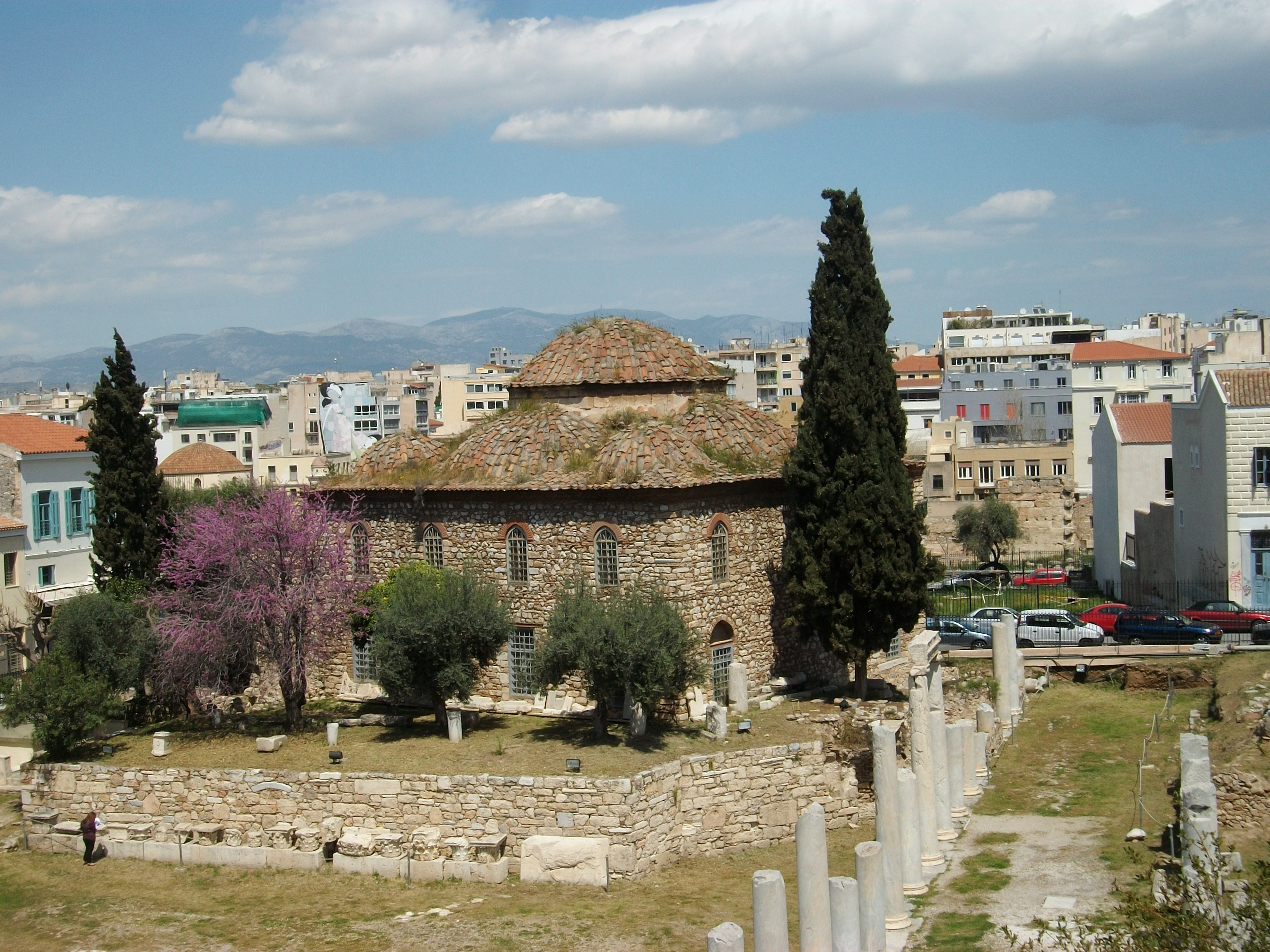 Antic fòrum romà i mesquita de Fethiye a Atenes.